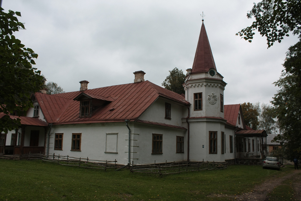 Arendoles muiža